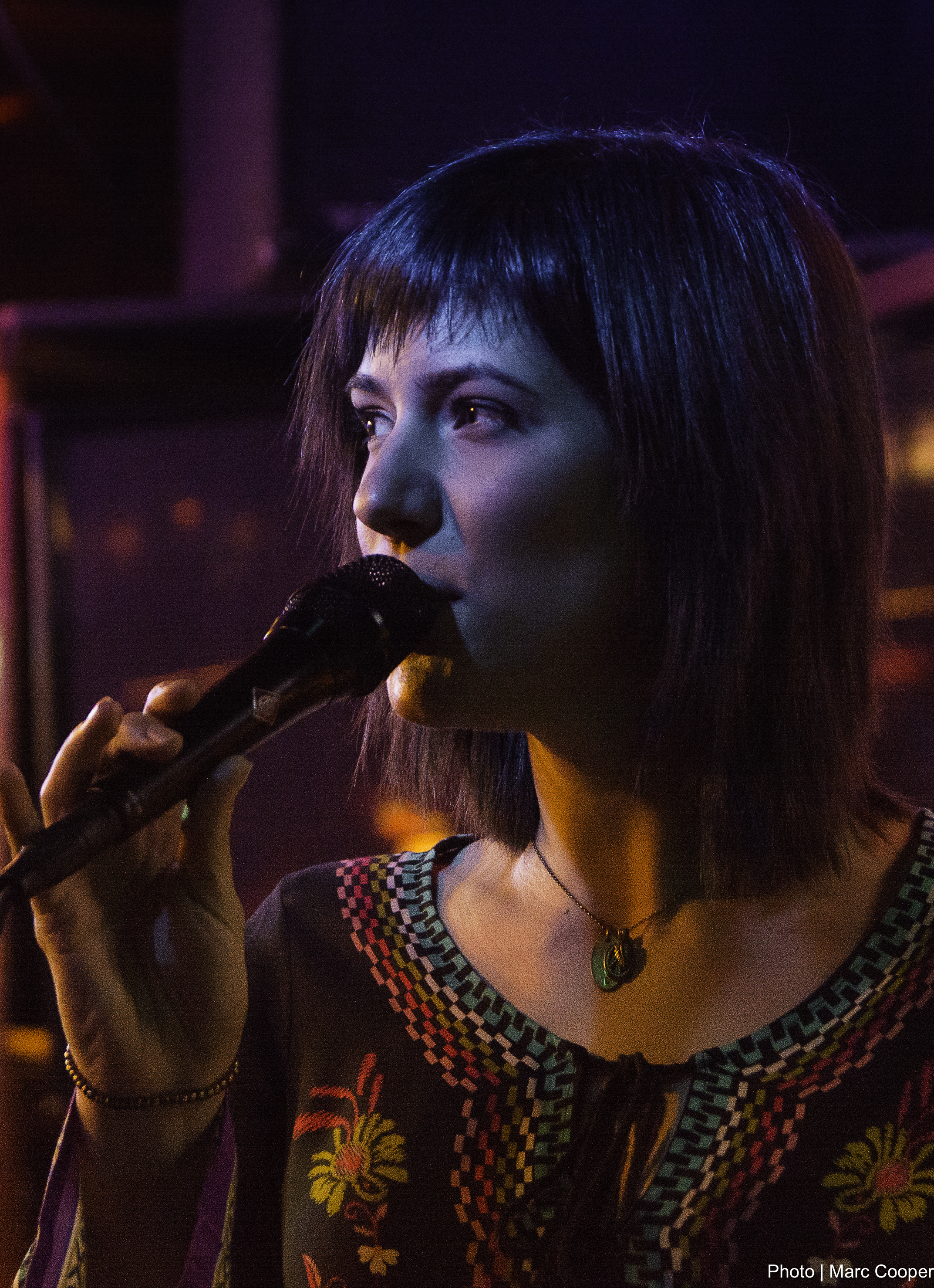 _DSC5458